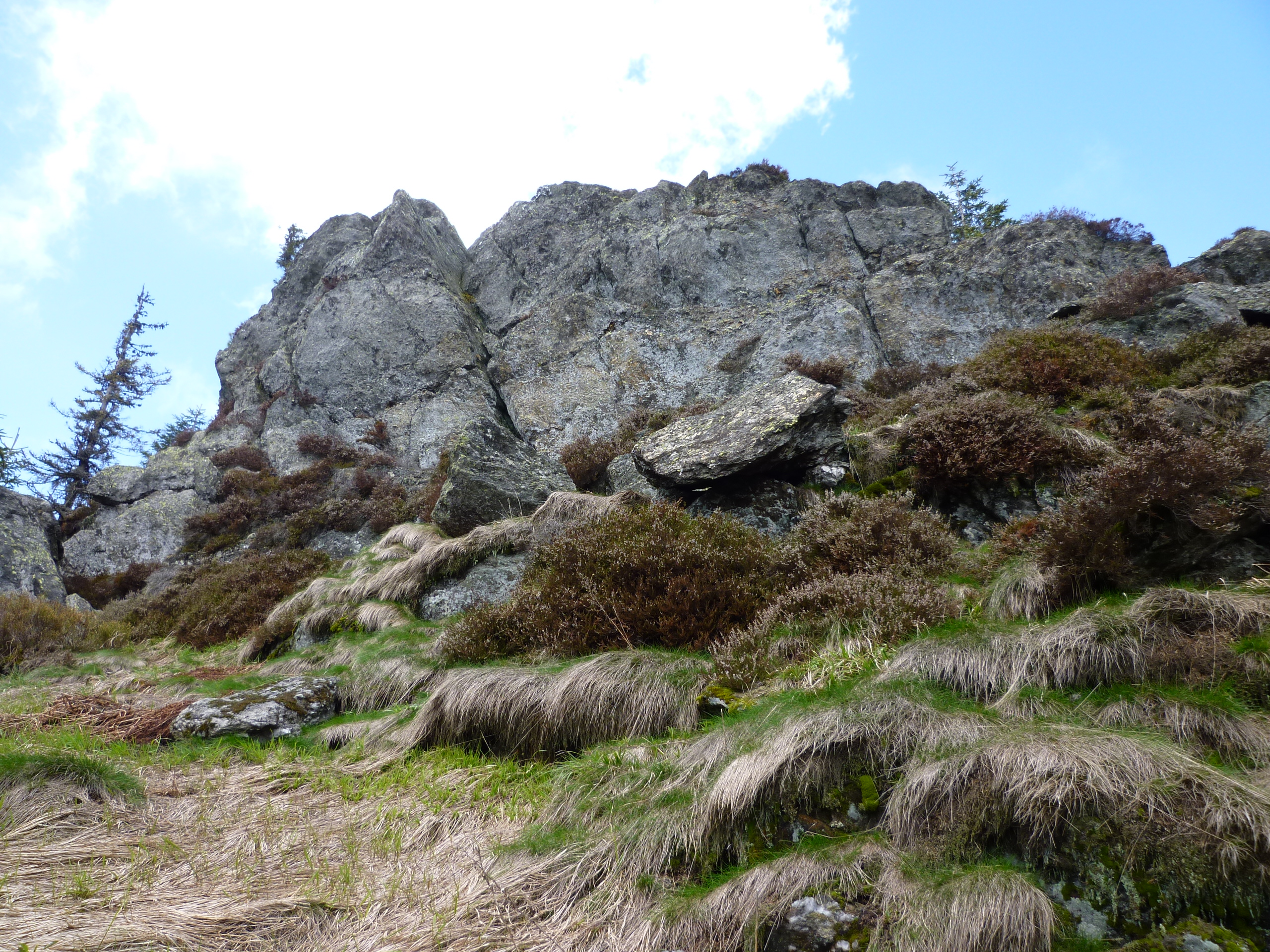 Felsrippe am Ossersattel. Neben Glimmerschiefer weist diese Region auch den "Osserquarzit" auf. Geotop Nr. 372R009 im Landkreis Cham.